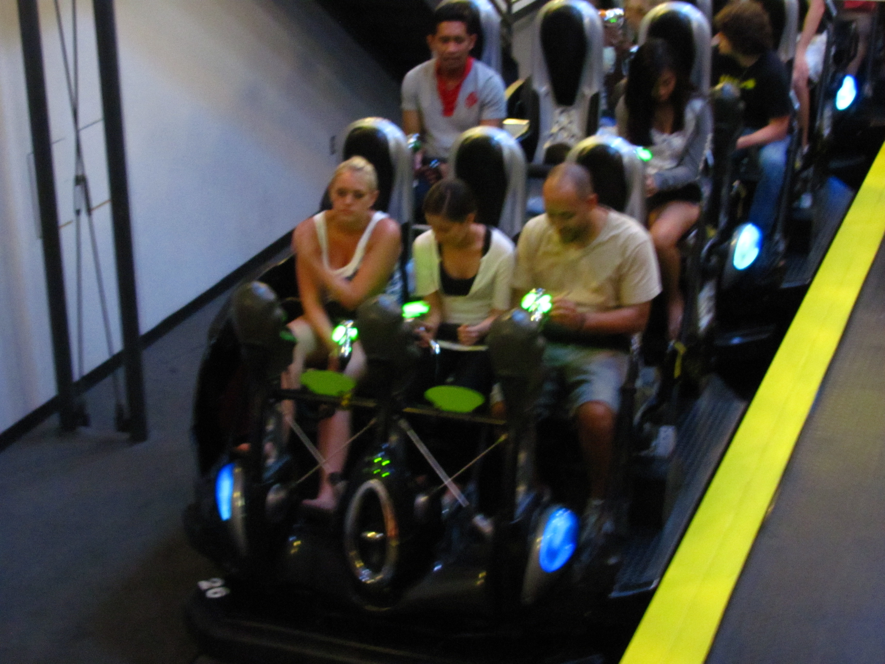 Men in Black: Alien Attack